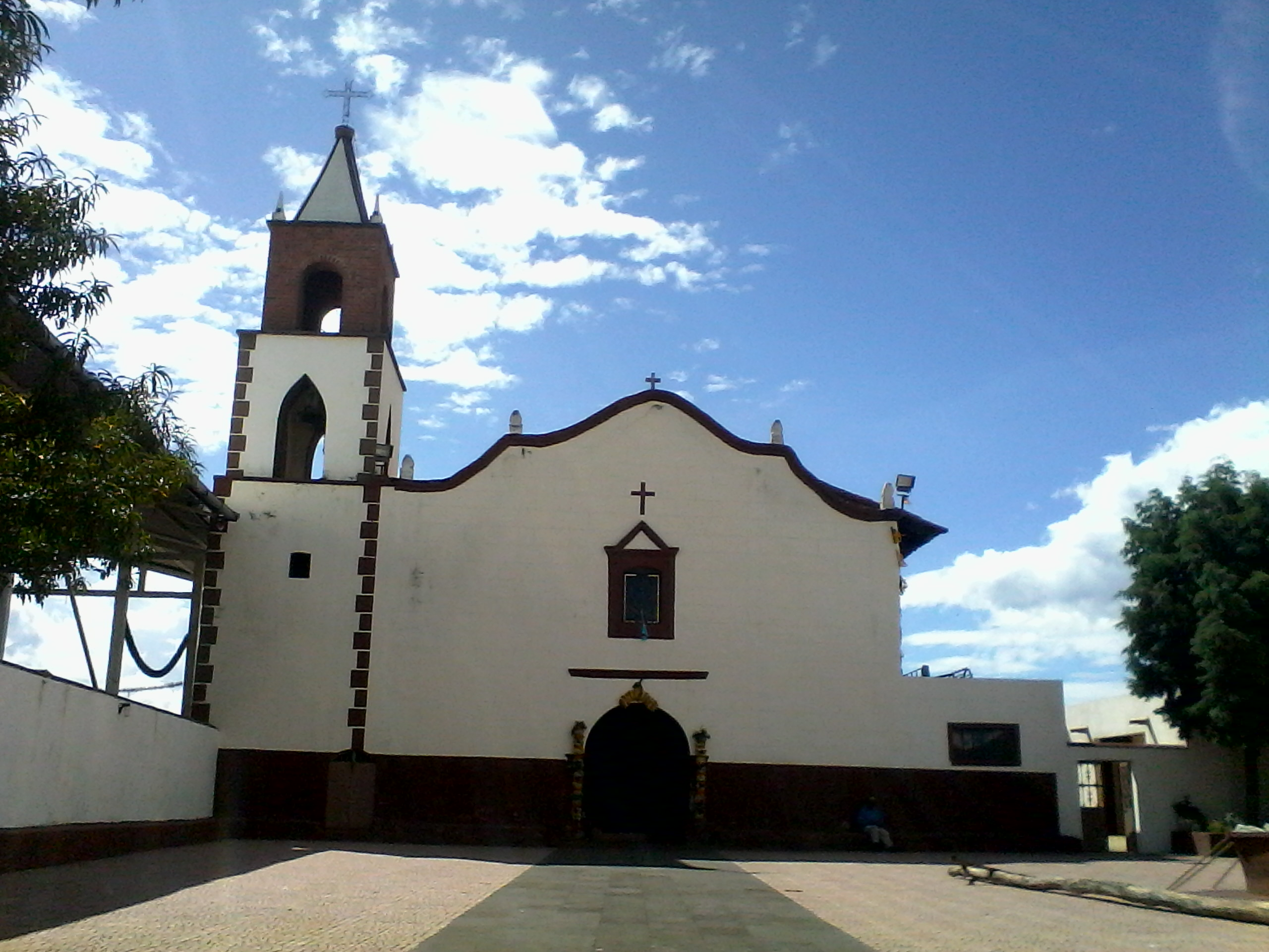 Capilla de la comunidad de tarejero